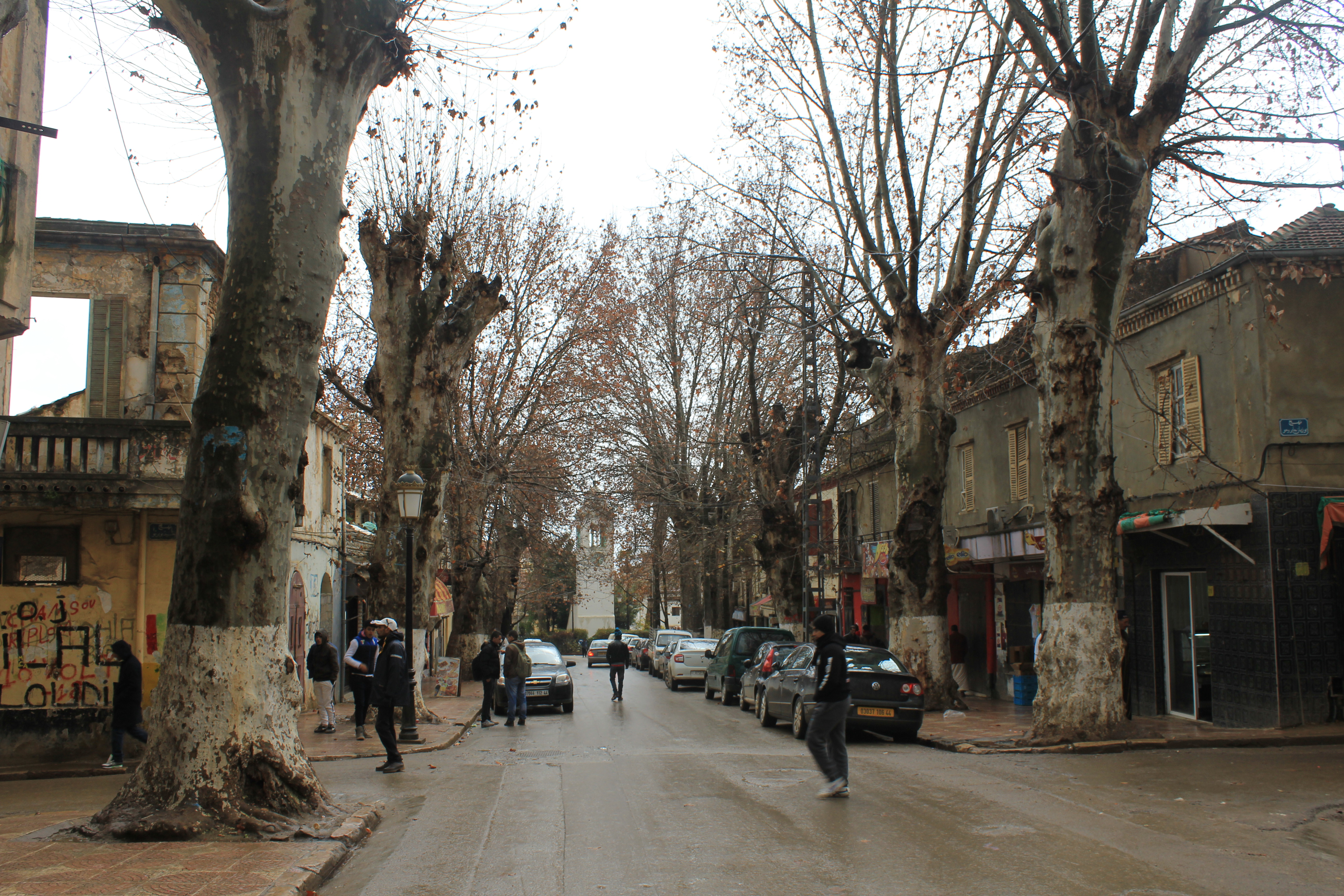 Miliana, Algeria